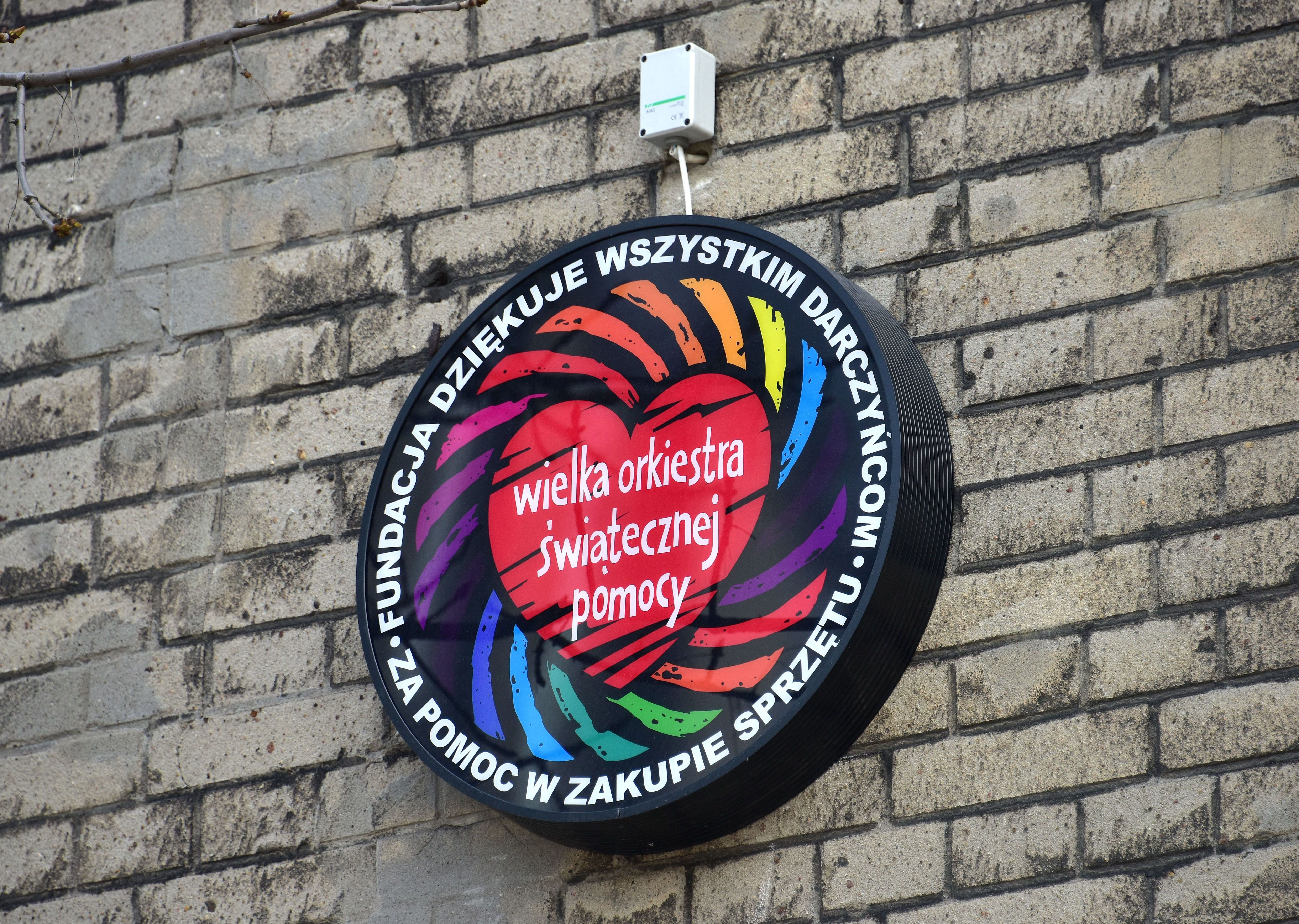 Kaseton WOŚP na fasadzie Samodzielnego Publicznego Szpitala Klinicznego im. prof. Witolda Orłowskiego Centrum Medycznego Kształcenia Podyplomowego przy ul. Czerniakowskiej 231 w Warszawie